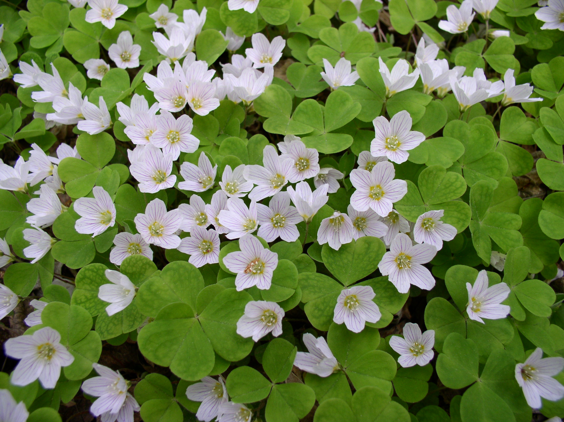 Oxalis acetosella